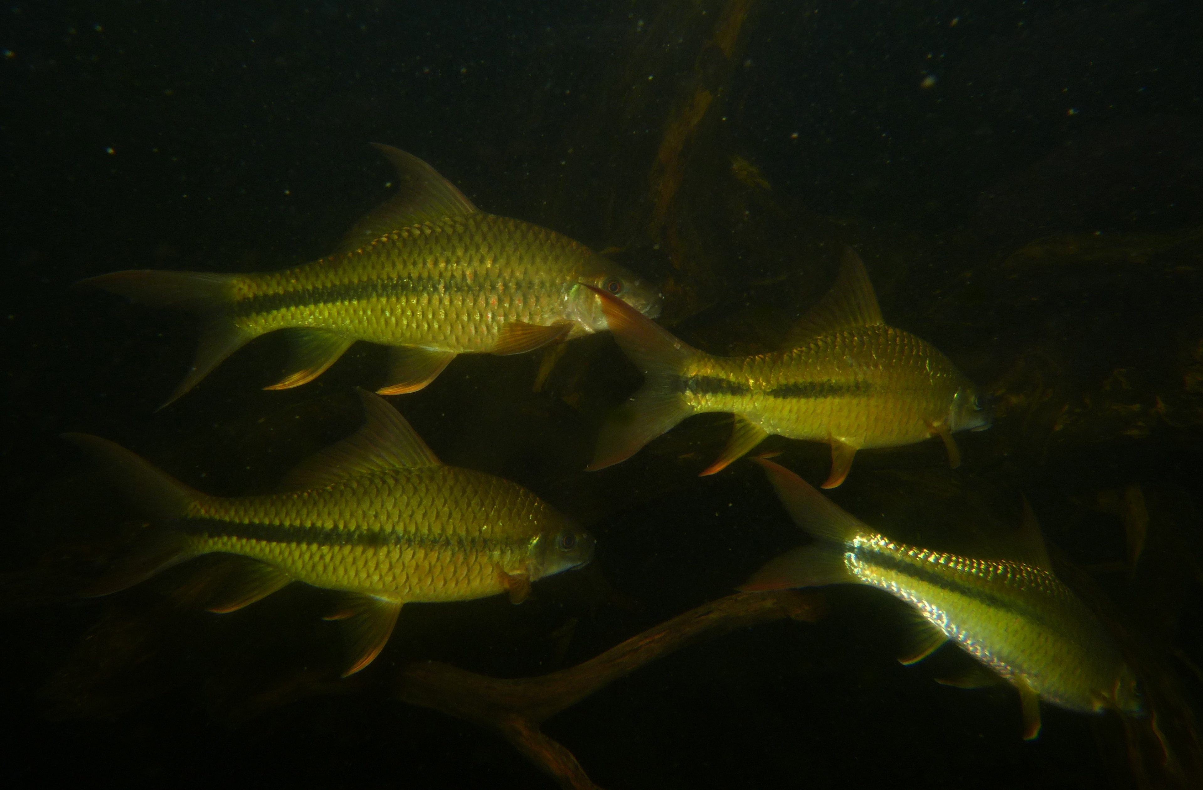 Headquarters Aquarium,Taman Negara NP, Pahang, MALAYSIA